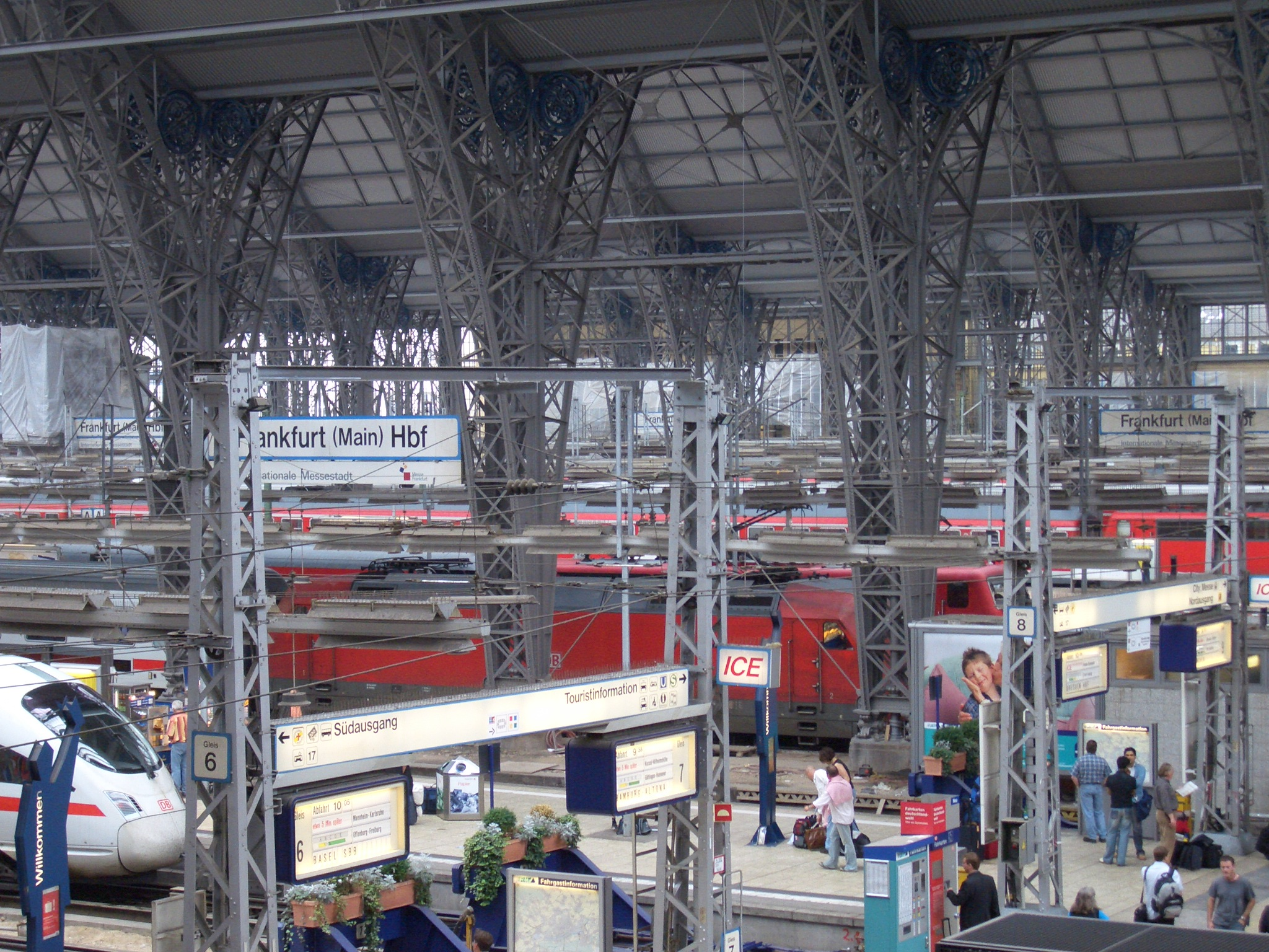 Bahnsteige im Hauptbahnhof Frankfurt am Main.